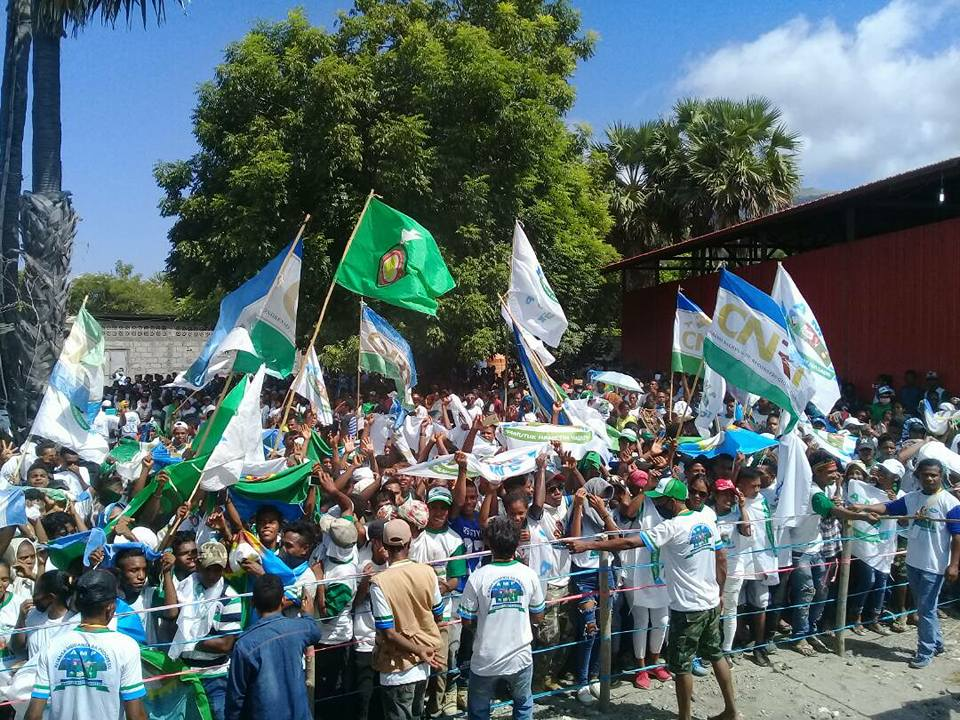 Wahlkampfveranstaltung der AMP auf Atauro, Oecusse, Osttimor